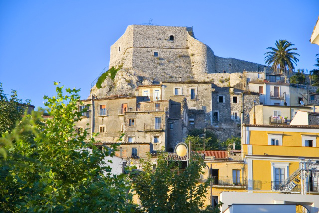 Scorcio del centro storico di Guardia Saframondi (BN) con il castello